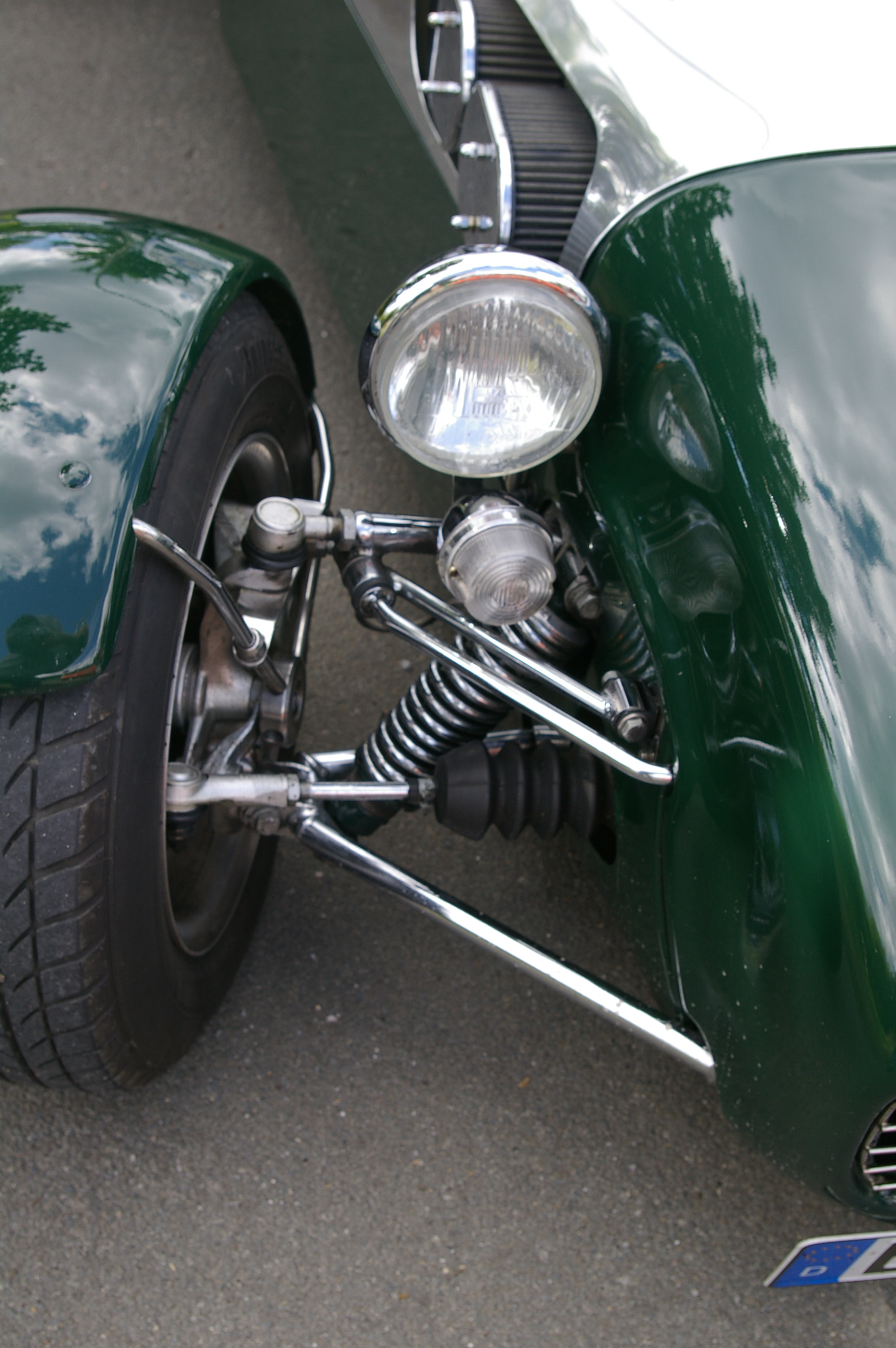 Lotus Seven. Eigenes Foto, August 2006.